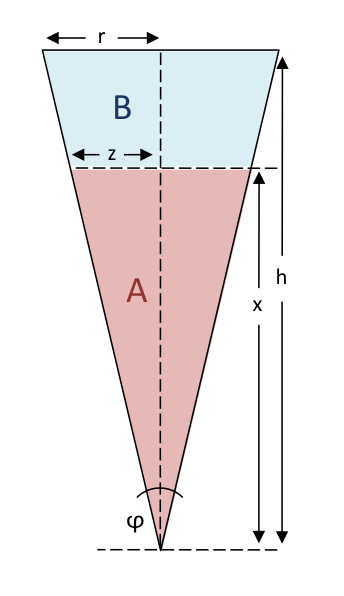 Frappé-Effekt